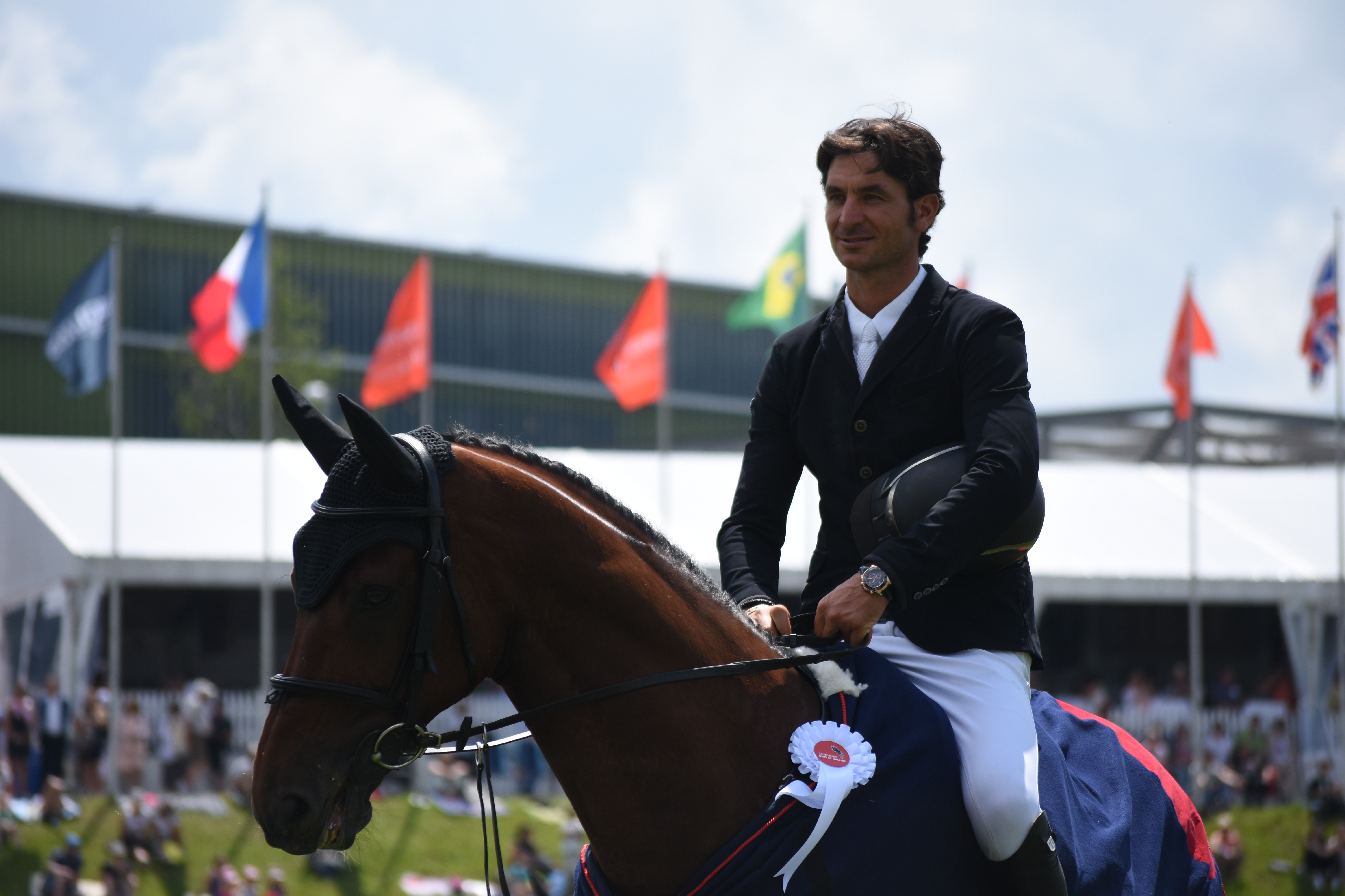 Steve Guerdat gewinnt den Preis der MS Direct AG auf Corbinian am CSIO St. Gallen 2018